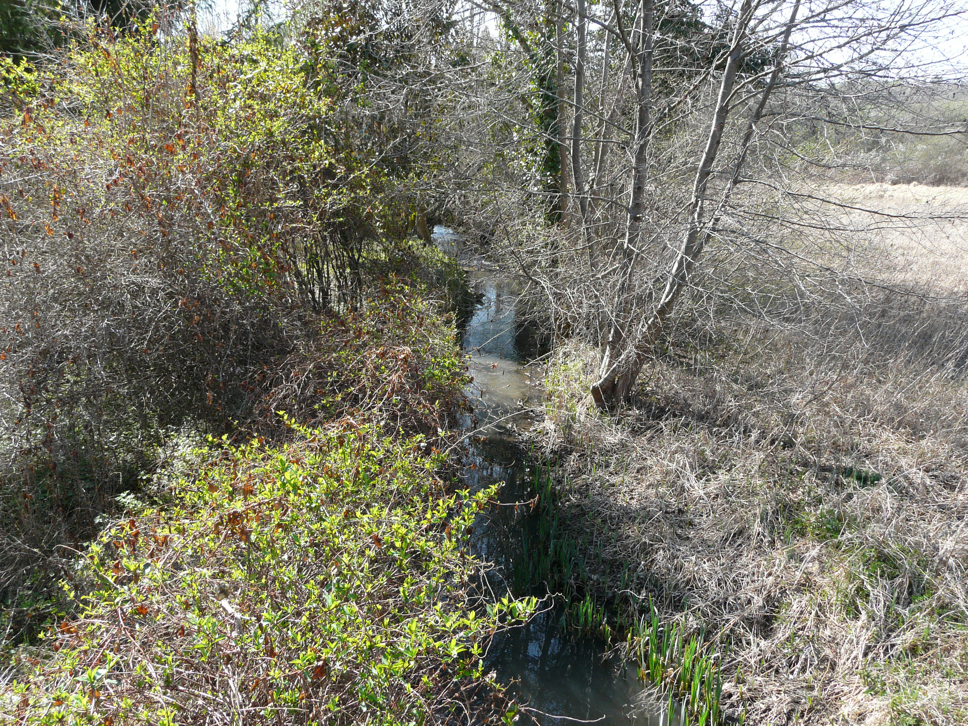 Le Boulou au nord-est du village de La Chapelle-Montmoreau, Dordogne, France. Vue prise en direction de l'aval.